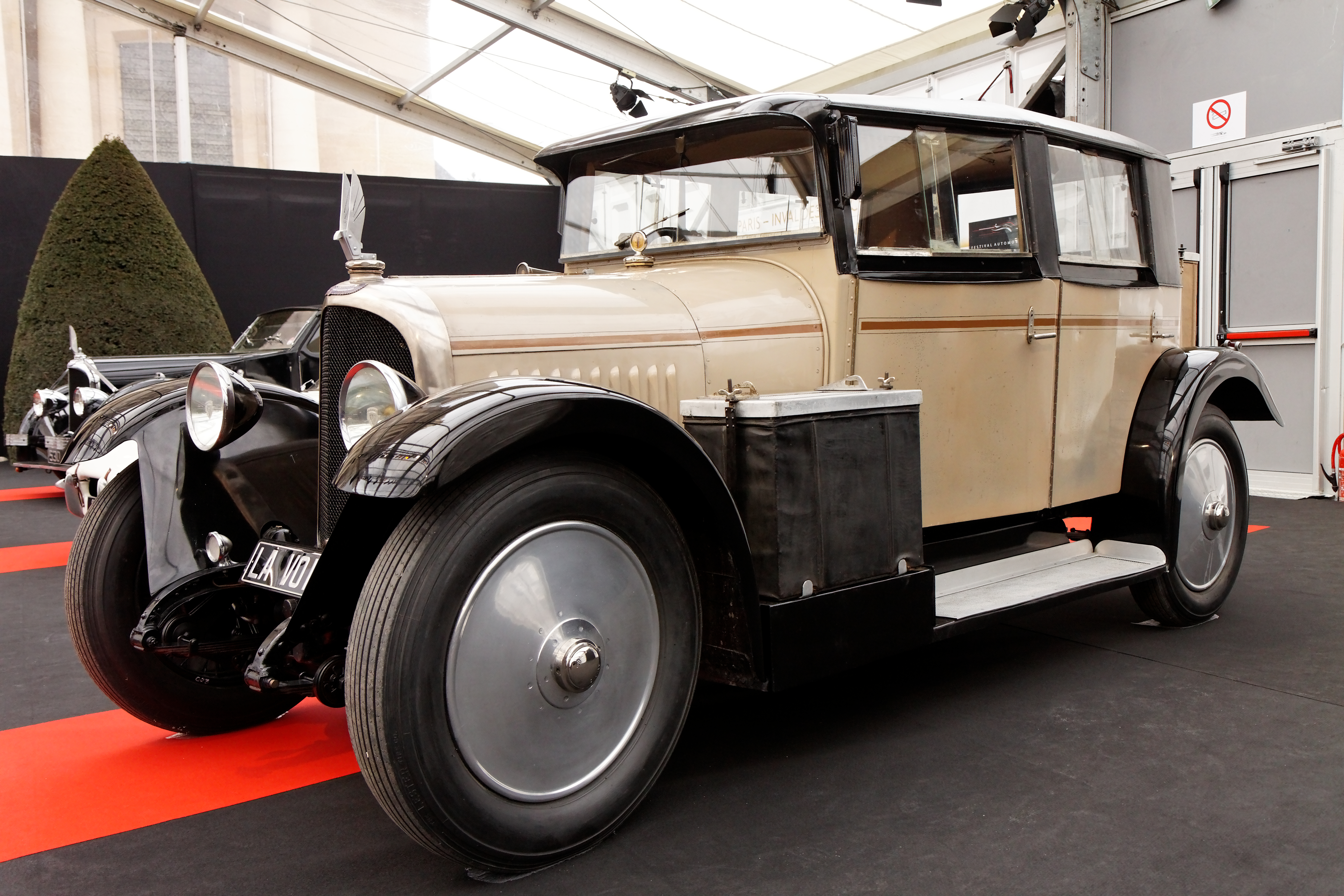 L'Avions Voisin C7 classique5 exposée devant le dôme des Invalides lors du festival automobile international 2011.